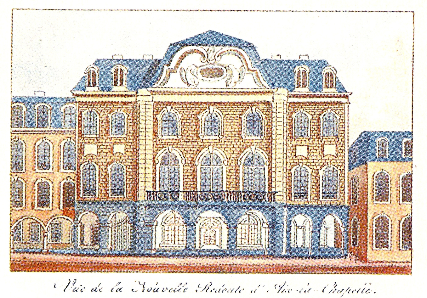 Aquarellierter Umrißkupferstich der Neuen Redoute (8,8 x 13,3 cm): Vue de la Nouvelle Redoute d'Aix -la-Chapelle